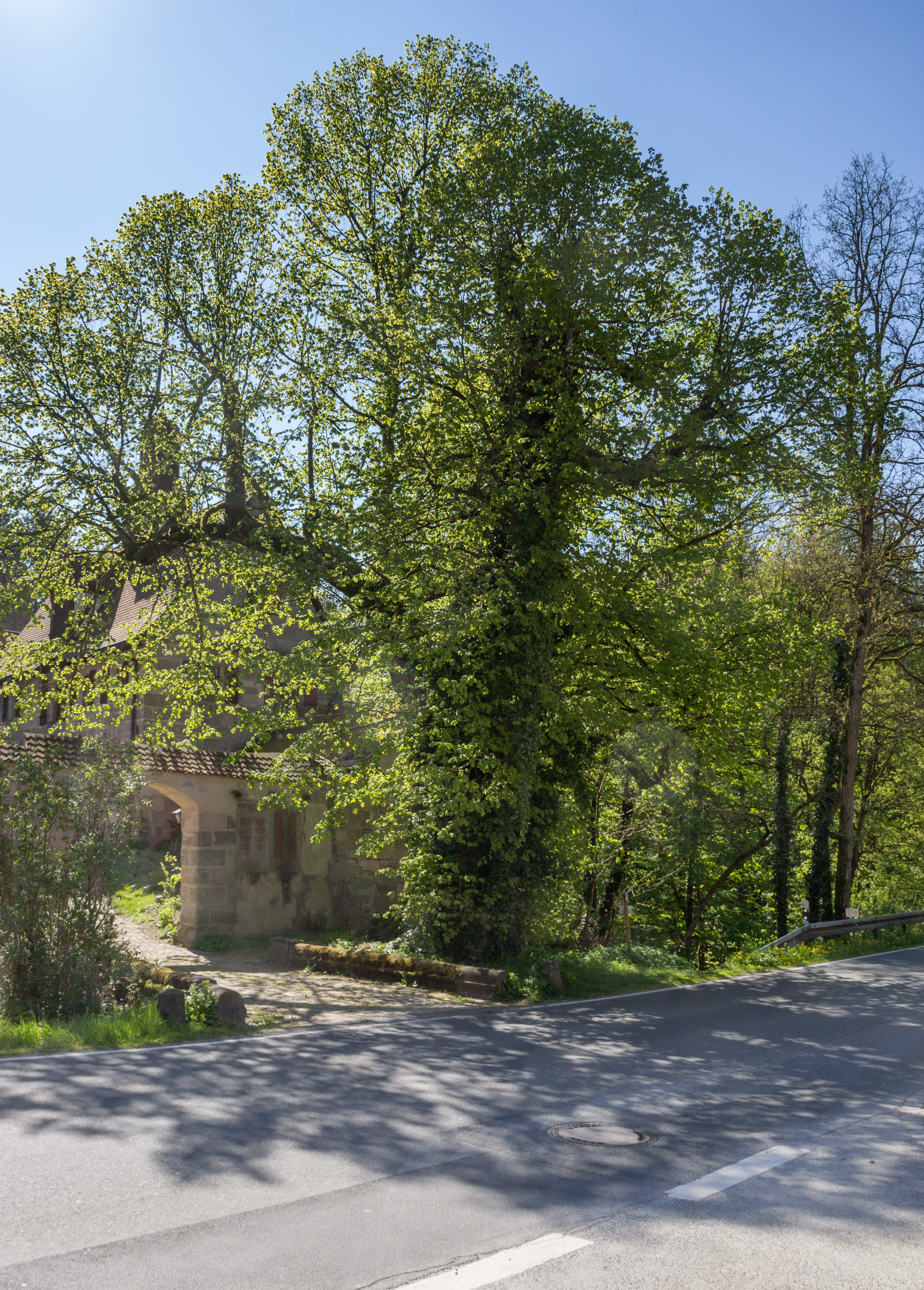 Die 2 Burglinden von Grünsberg, Naturdenkmal (ND-04673), Burg Grünsberg, Altdorf